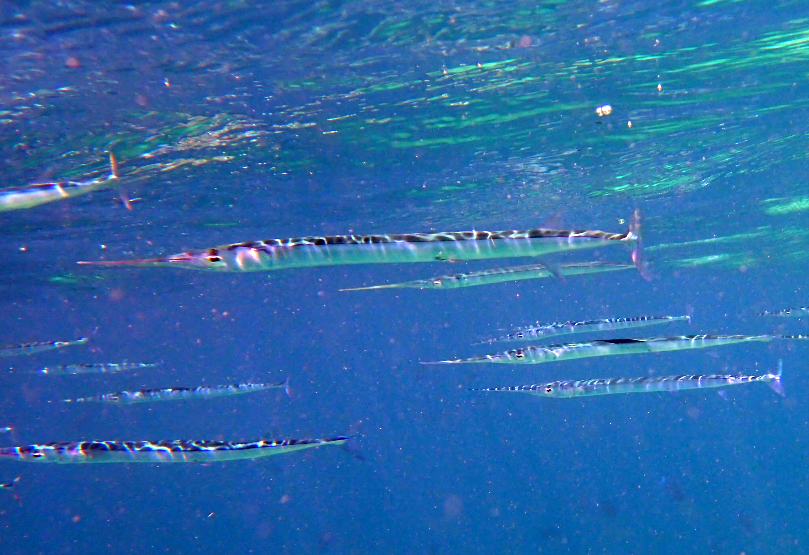 Un banc de Platybelone argalus aux Maldives (atoll de Baa).